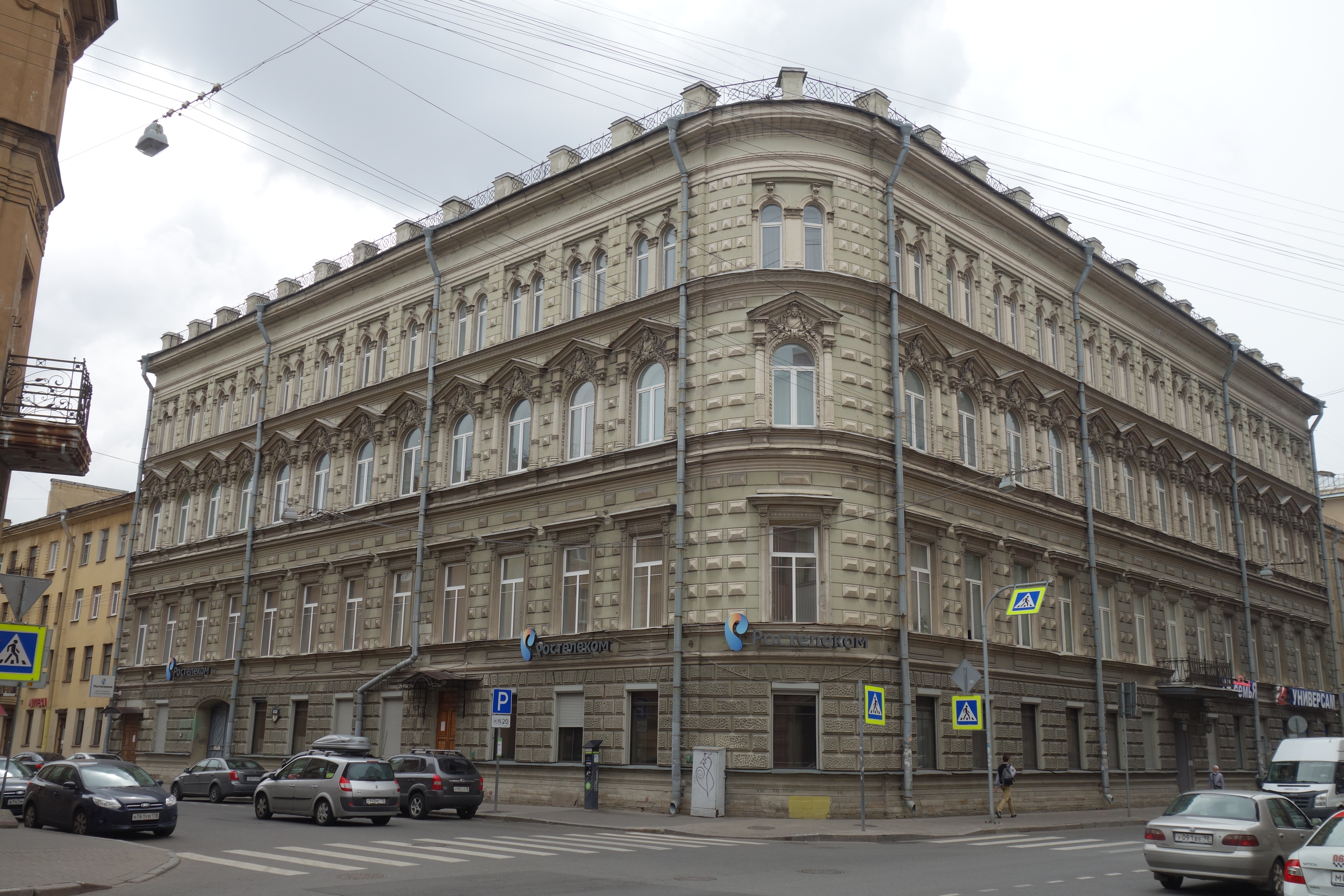 Georgij Ivanov Haus der Literaten in St. Petersburg